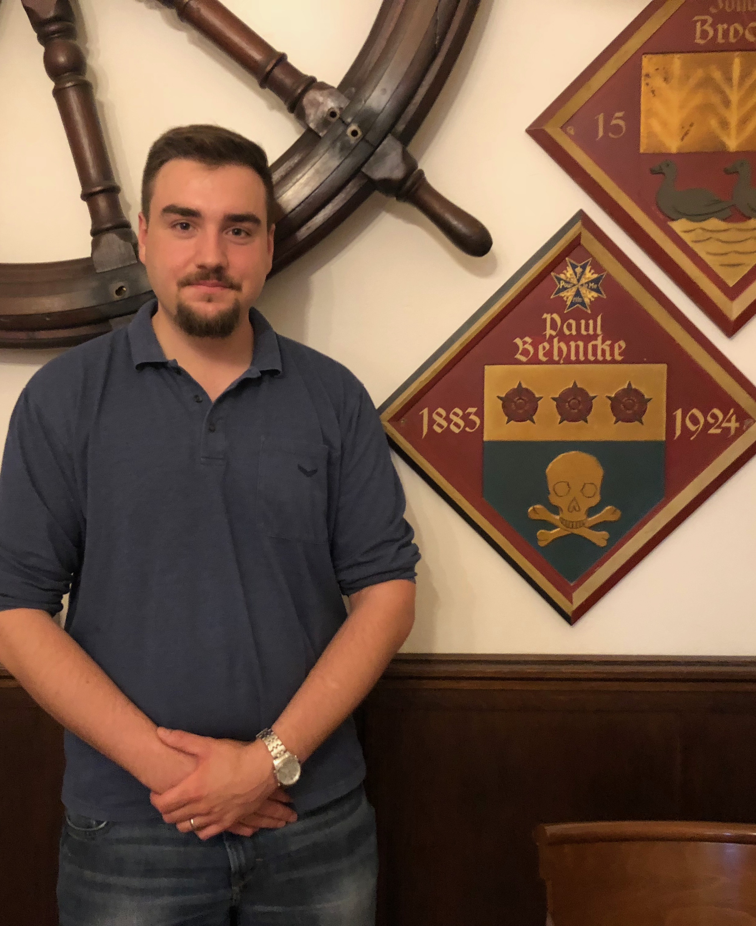 Nachfahre Florian Behncke beim Besuch des Ratskellers zu Lübeck, neben dem Wappen Paul Behnckes.